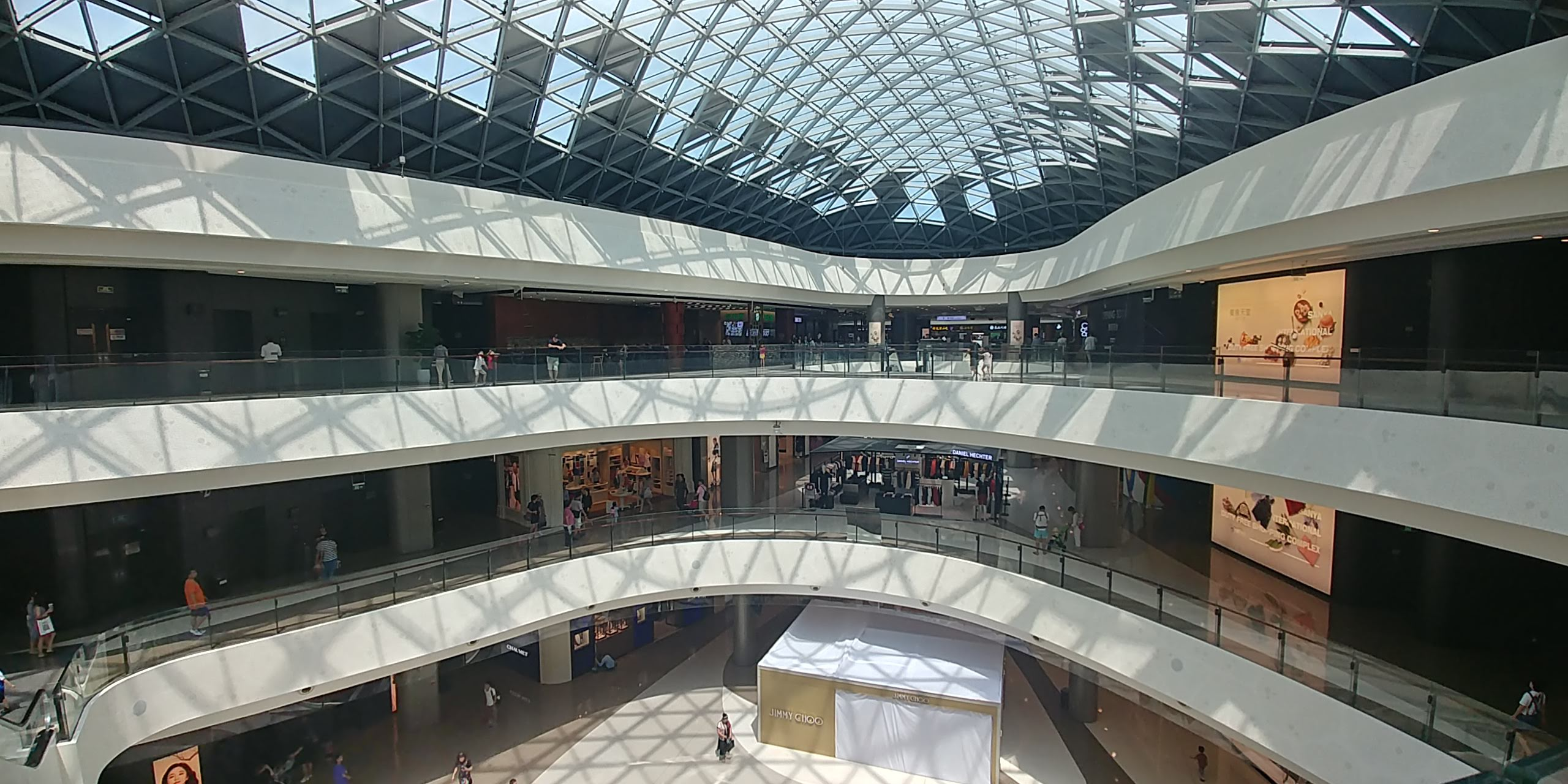 中文（香港）: 中國免稅三亞免稅店